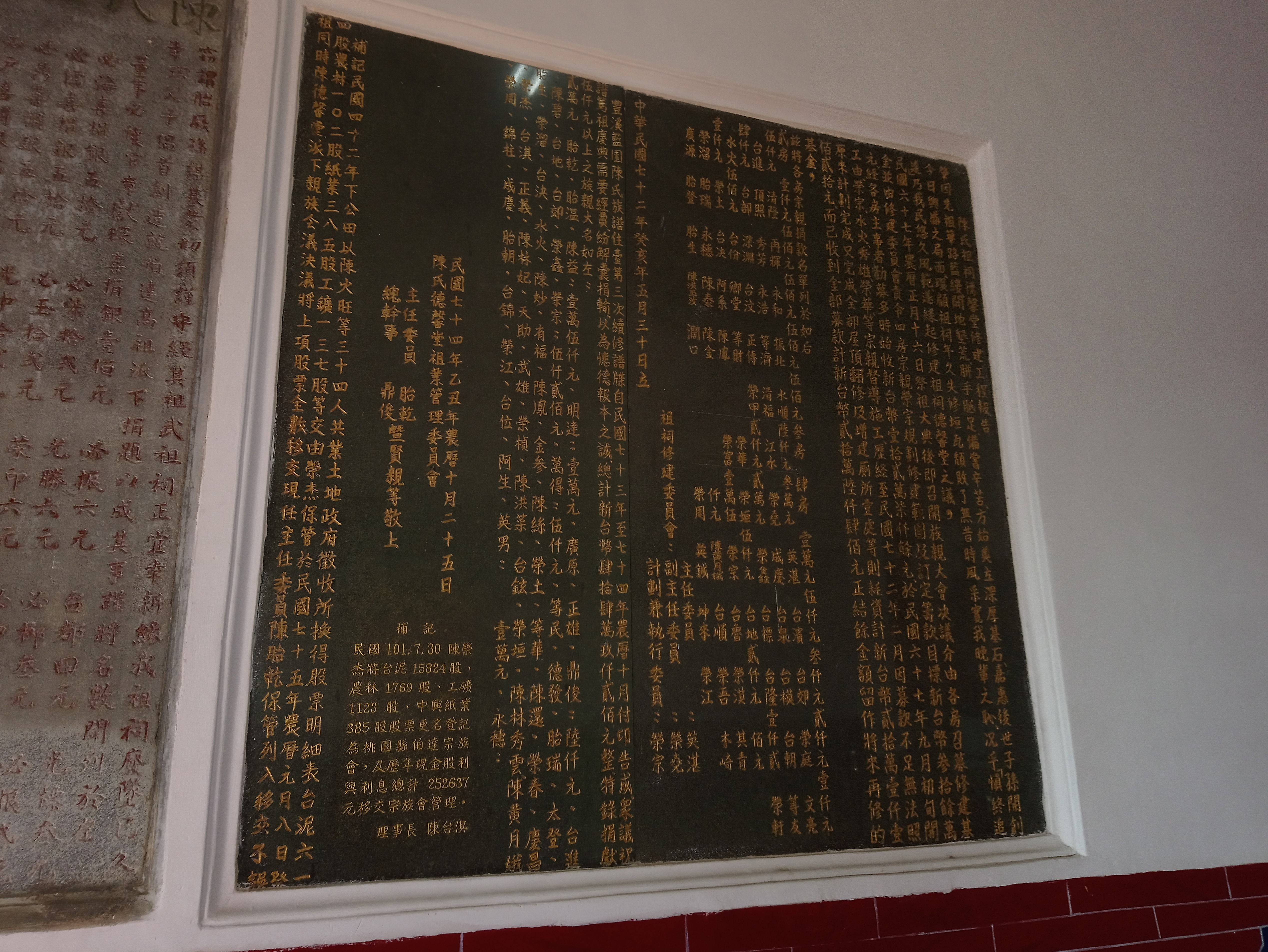 陳氏祖祠德馨堂修建工程報告,桃園市蘆竹區南崁地區山鼻里